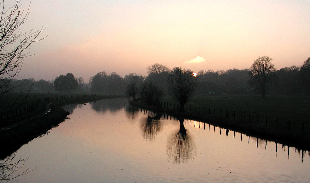 Kromme Rijn, Bunnik. foto door Ruben Burbach [1]